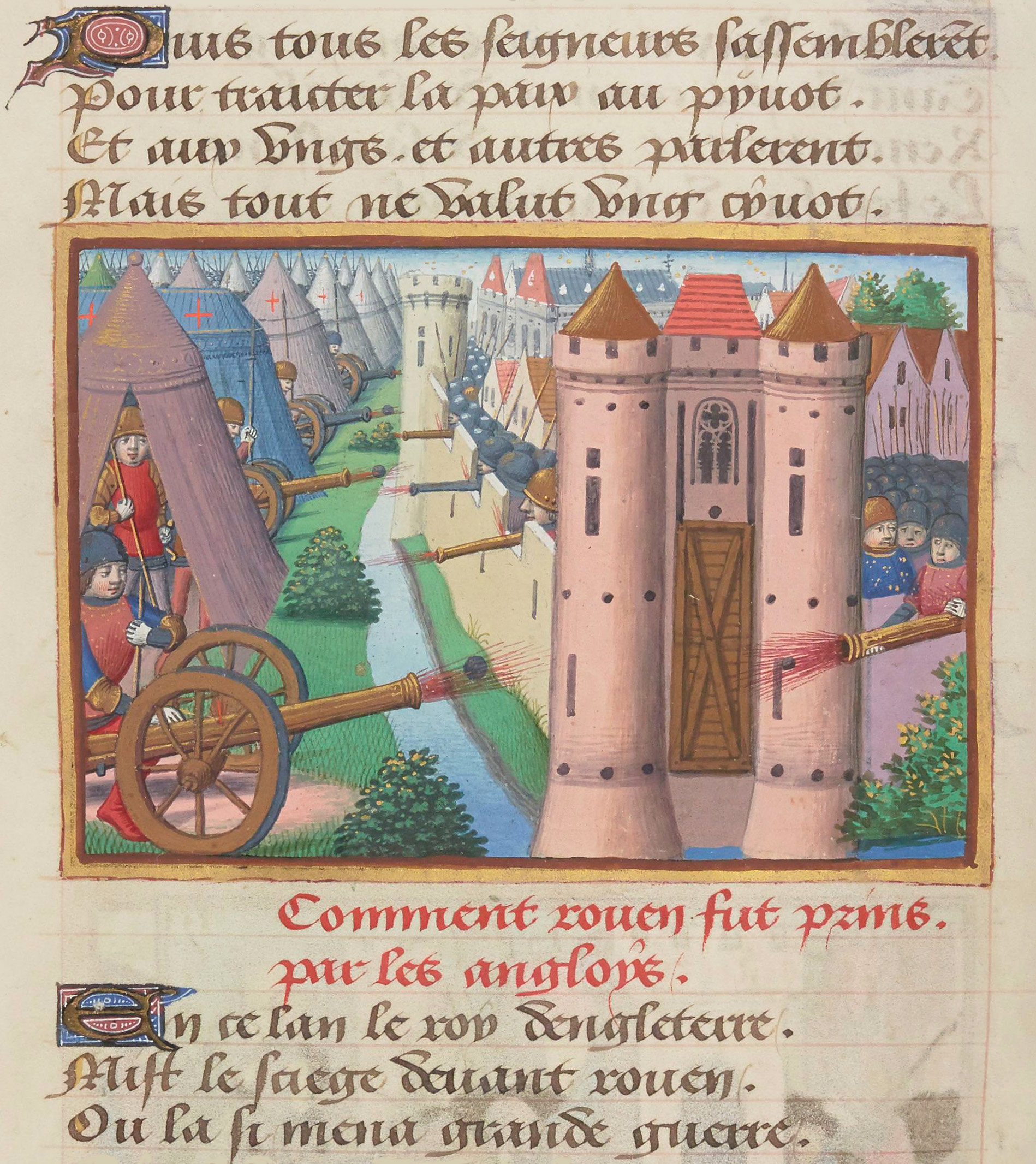 Le siège de Rouen.